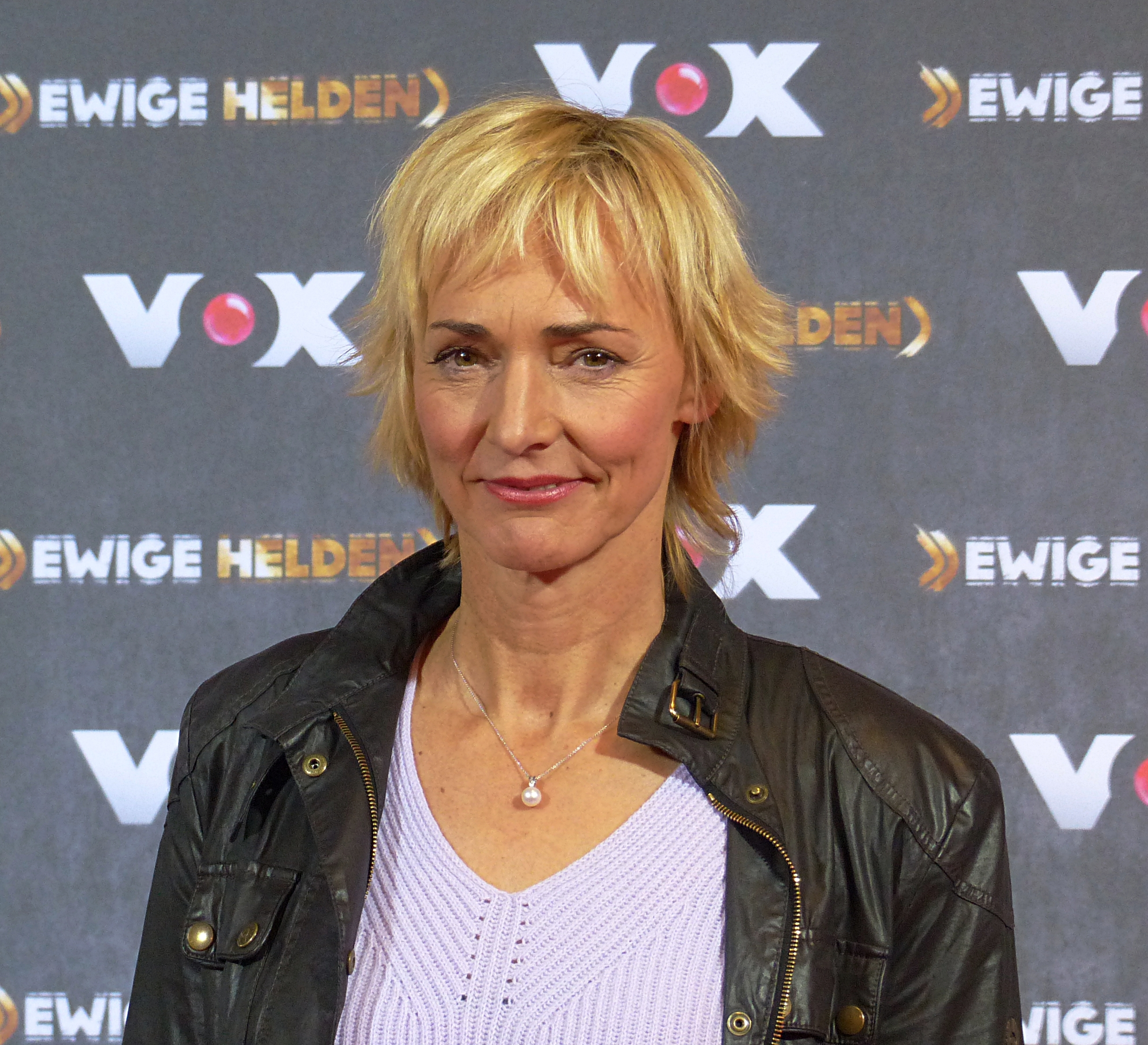 Heike Drechsler beim VOX "Ewige Helden" Pressetermin, im Dezember 2015.